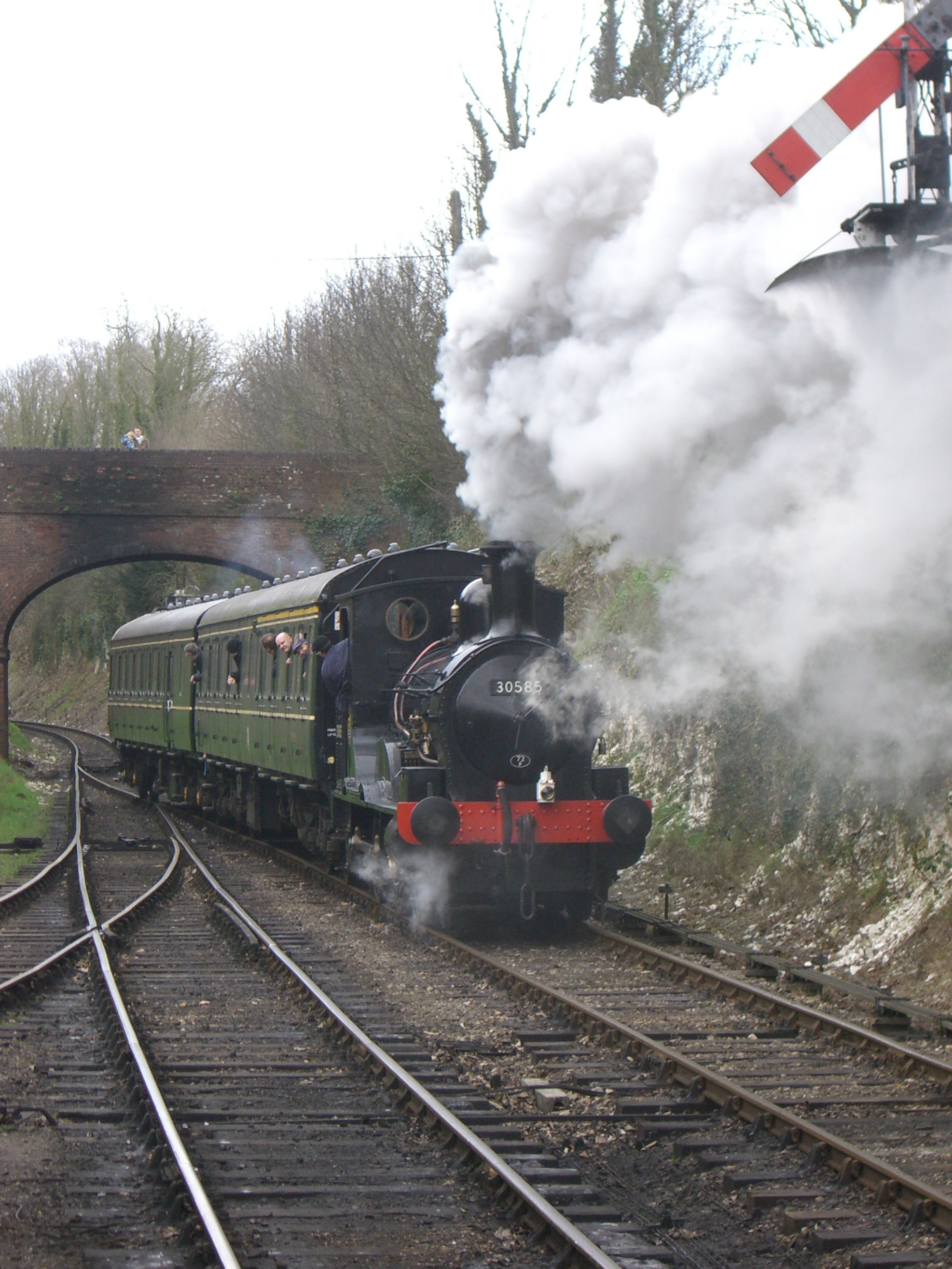 Beattie Well Tank